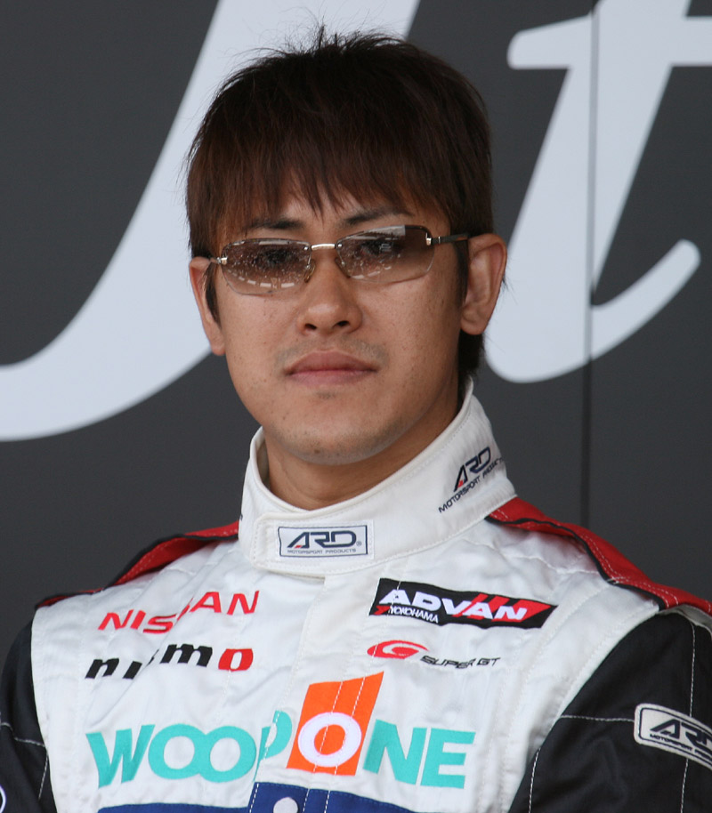 Super GT 2008 Rd.3: Seiji Ara (Kondo Racing)